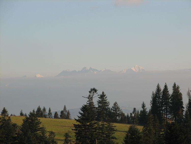 Tatry z Rdzawki